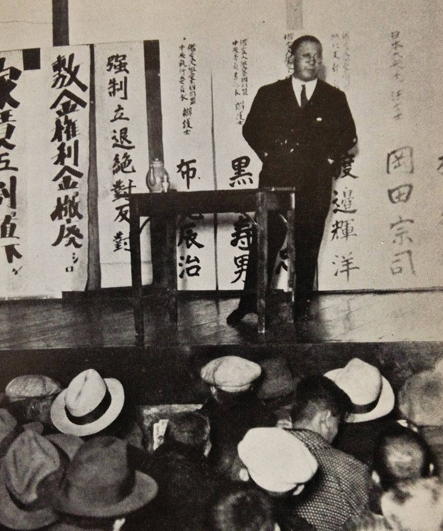 布施辰治（借家人同盟の演説会にて）